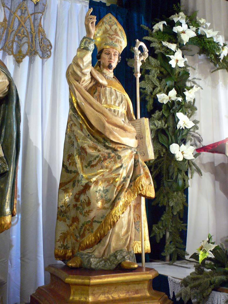 Talla barroca de San Fulgencio realizada por Francisco Salzillo en el s.XVIII. Iglesia de Sta.María de Gracia en Cartagena (España)